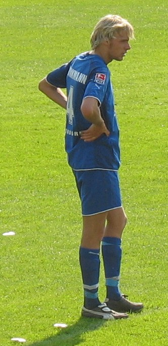 Daniel Brinkmann (SC Paderborn 07)